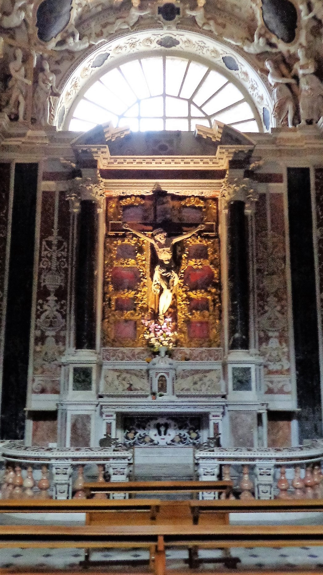 Interno chiesa